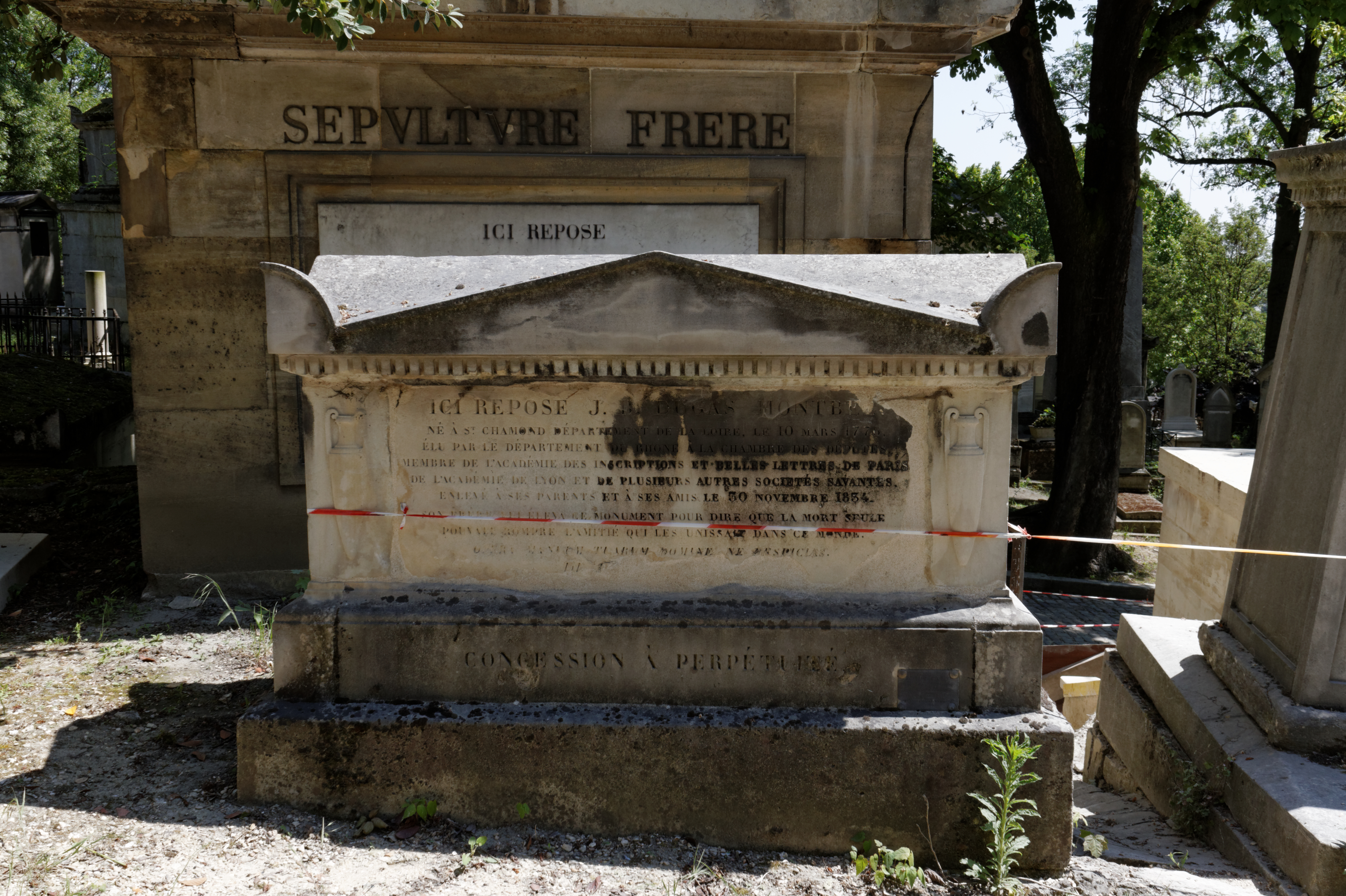 Sépulture de Jean Baptiste Dugas-Montbel (1776-1834), helléniste et homme politique français, connu pour ses traductions des œuvres d'Homère. Monument de forme rectangulaire.